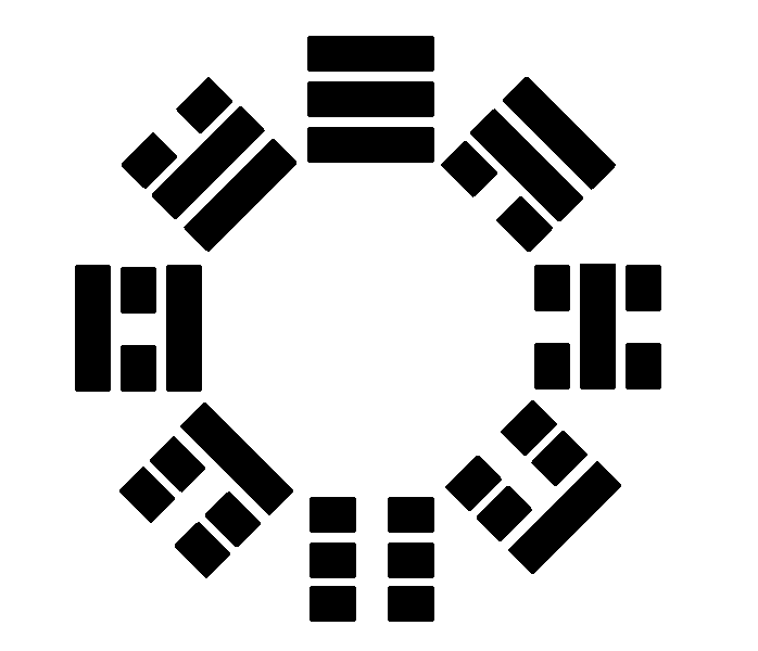 trigramas do Pa Kua (Ba Gua) dispostos segundo o arranjo Pré Natal